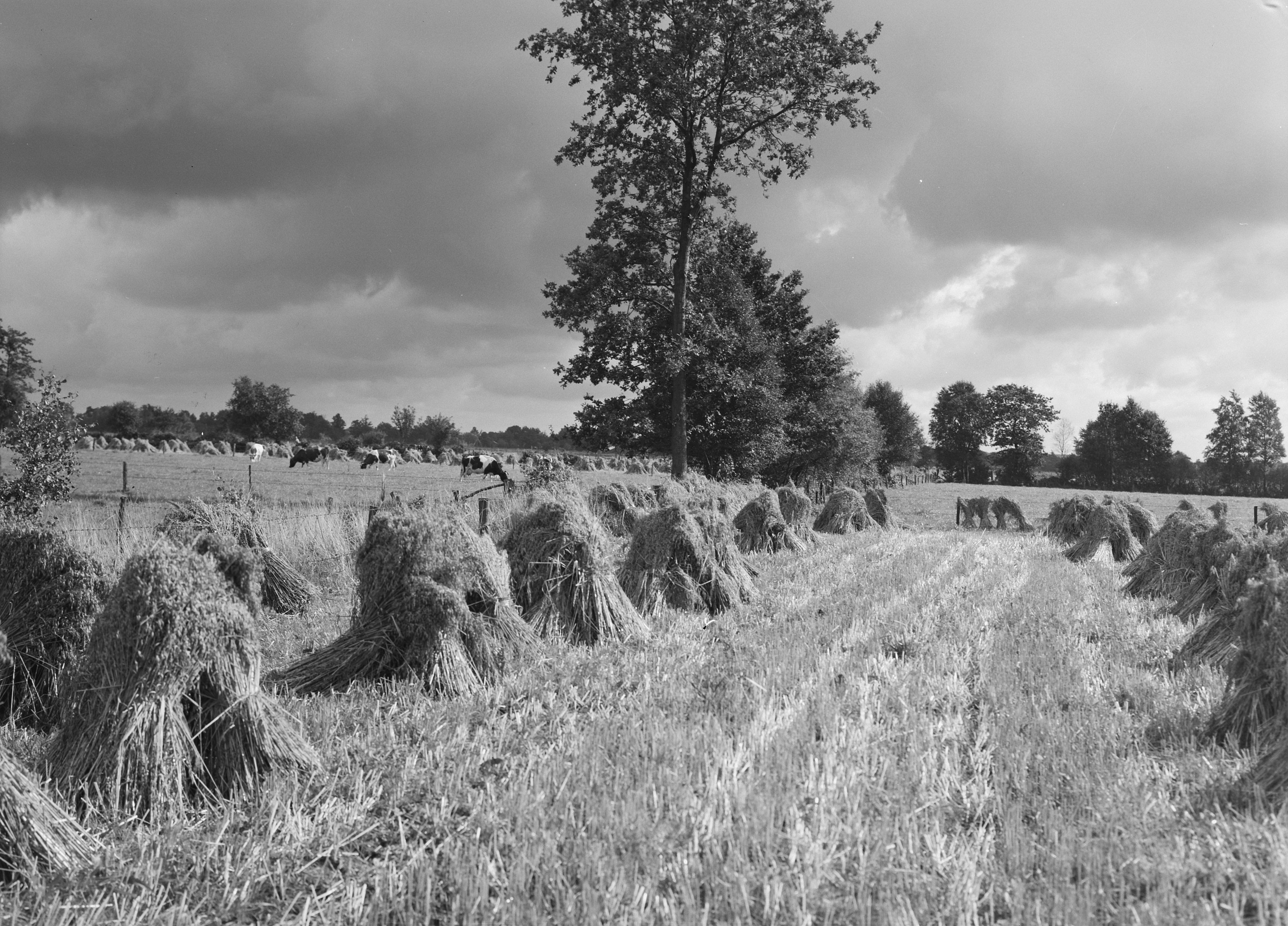 Collectie / Archief : Fotocollectie Nederlandse Heidemaatschappij Reportage / Serie : [ onbekend ] Beschrijving : karakteristieke landschappen, rogge, Nieuw-Heeten Datum : ongedateerd Locatie : Nieuw-Heeten Trefwoorden : karakteristieke landschappen Persoonsnaam : rogge Fotograaf : [onbekend] Auteursrechthebbende : Nationaal Archief Materiaalsoort : Negatief (zwart/wit) Nummer archiefinventaris : bekijk toegang 2.24.06.02 Bestanddeelnummer : 250-8206